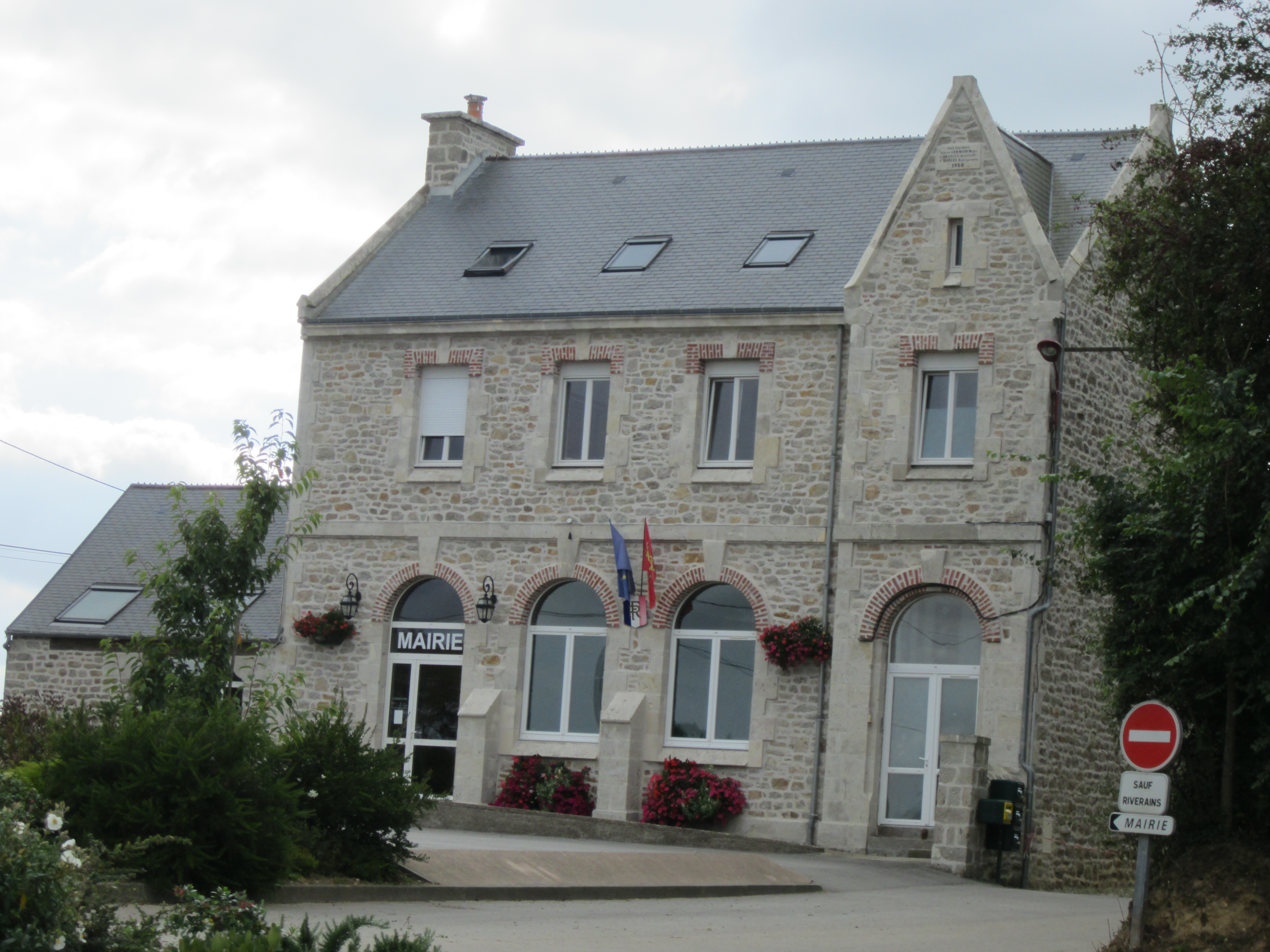 Gonneville